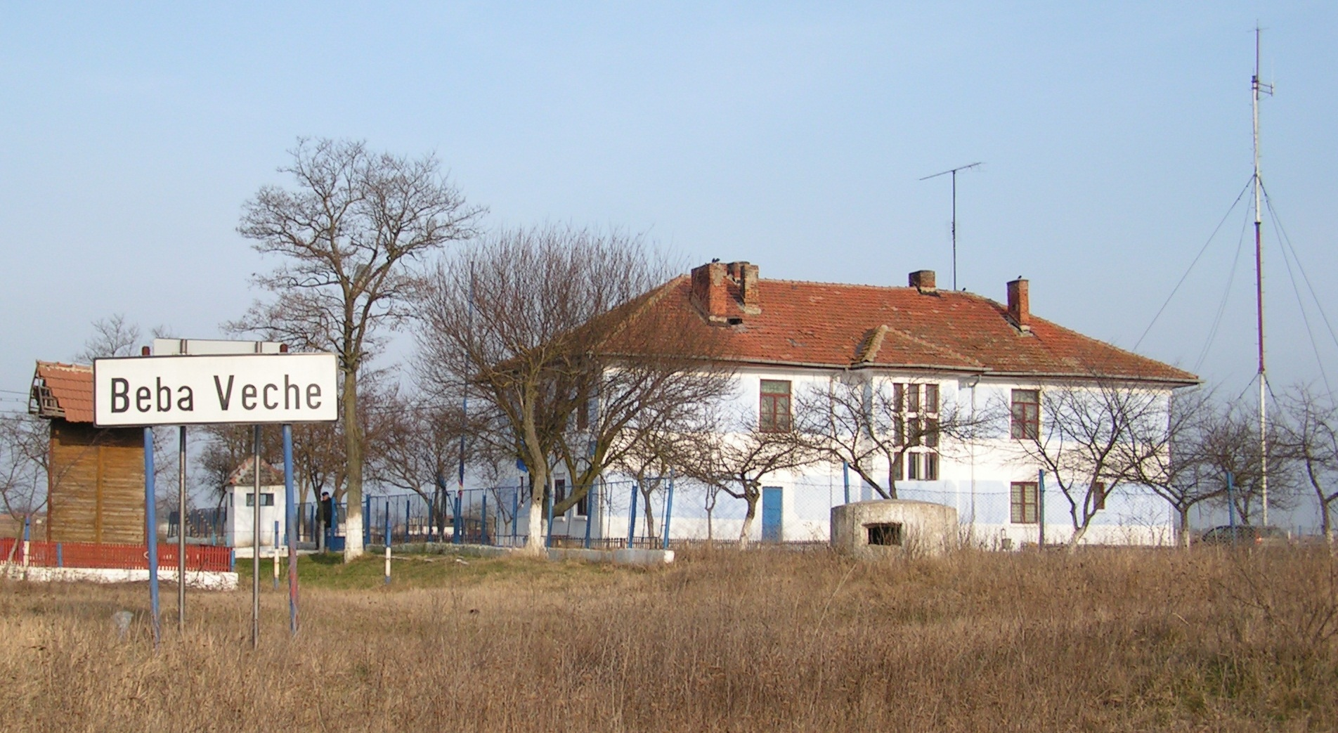 Intrarea in Beba Veche, dinspre frontiera. Pichetul de graniceri in dreapta imaginii.